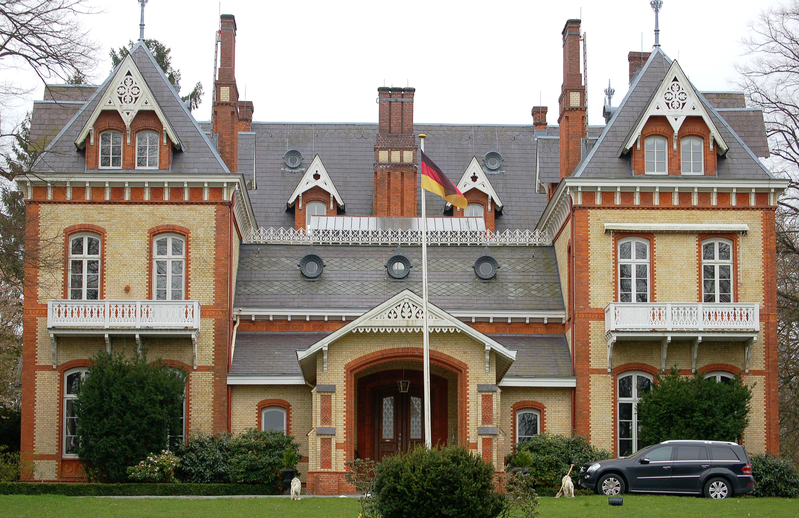 Vorderseite des Schloss Düneck in Moorrege